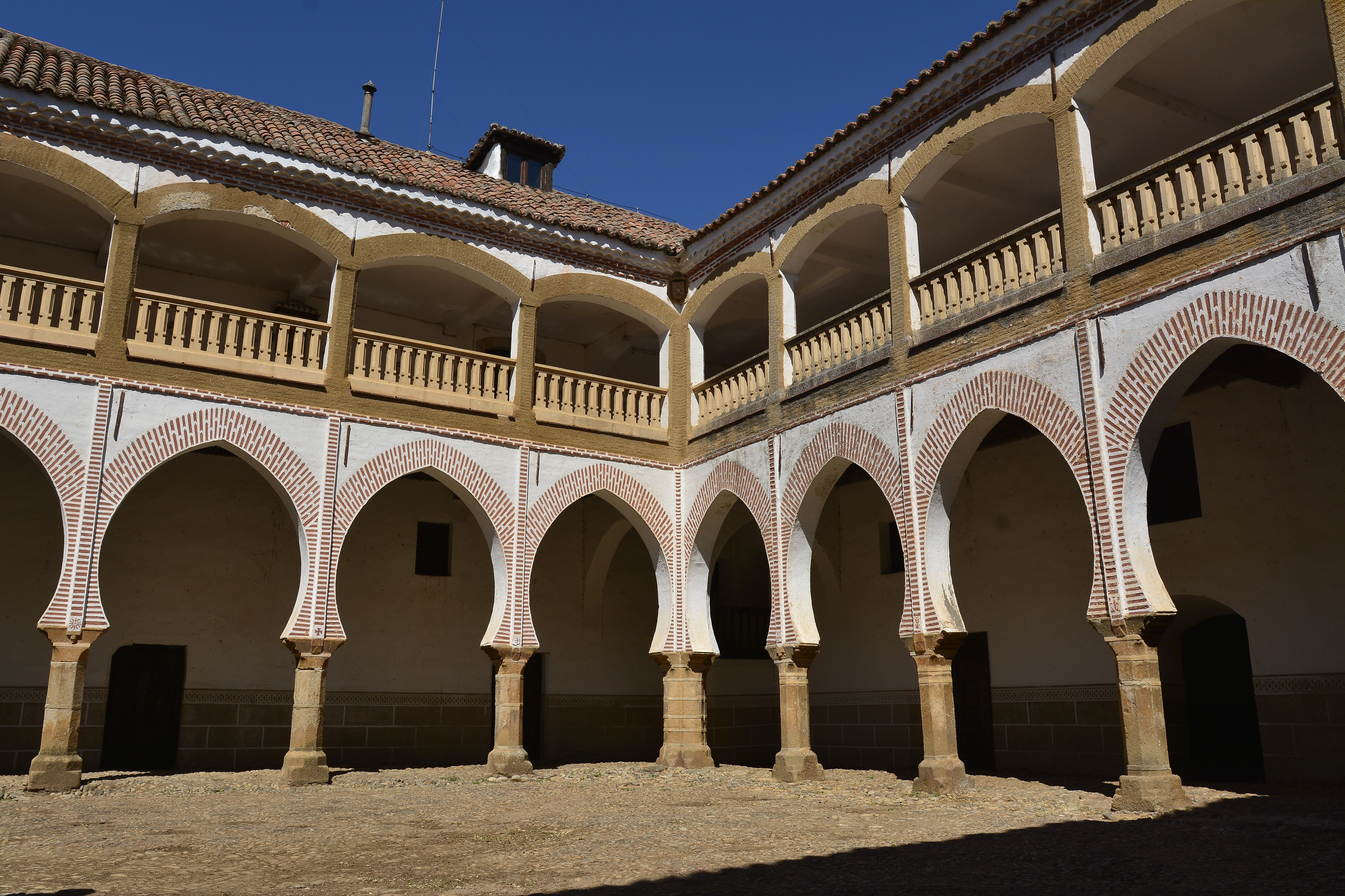 Patio